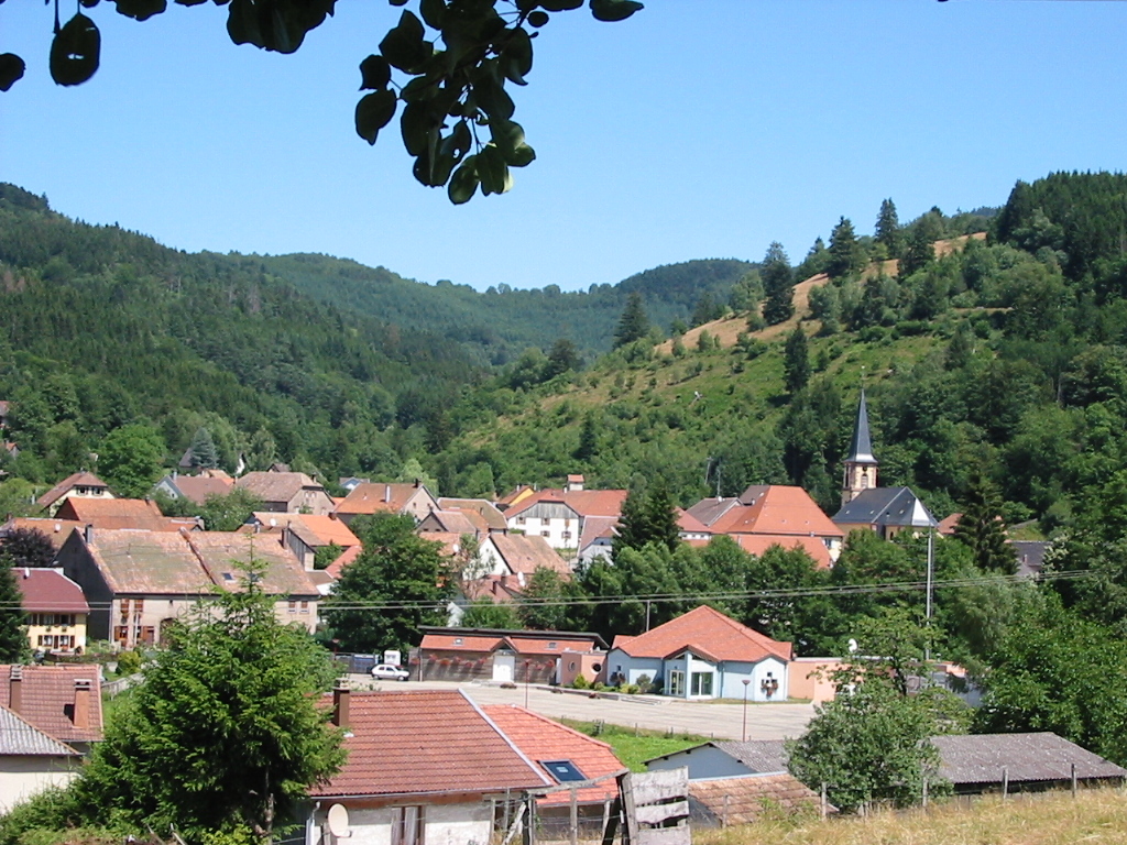 Colroy-la-Roche Commune du Bas-Rhin Photographie personnelle, prise le 17 juillet 2006 Copyright © Christian Amet